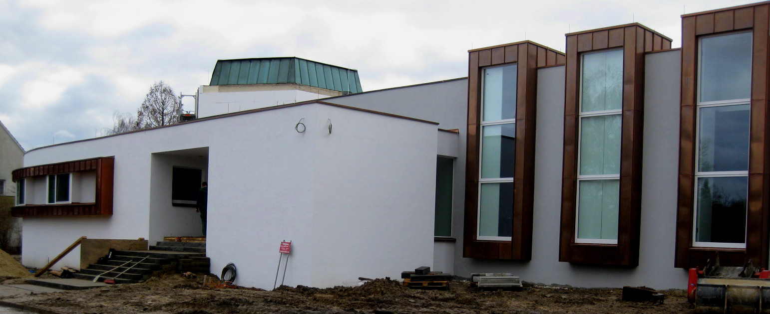 Die Synagoge (Osnabrück) von 1967/1969 von Hermann Zvi Guttmann mit dem Erweiterungsbau von 2008/2010 von Alfred Jacoby (im Vordergrund)